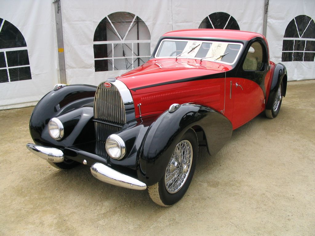 Bugatti Typ 57 Atalante Baujahr 1936, fotografiert von Ramgeis in Pebble Beach, Kalifornien im August 2004, GNU-FDL